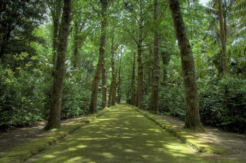 An avenue of Ginkgo biloba, Terra Nostra Garden in Furnas, São Miguel, Azores